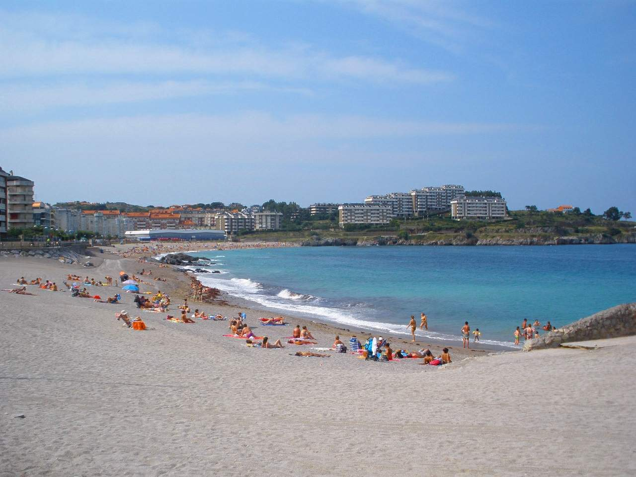 Castro Urdiales - Playa de Ostende